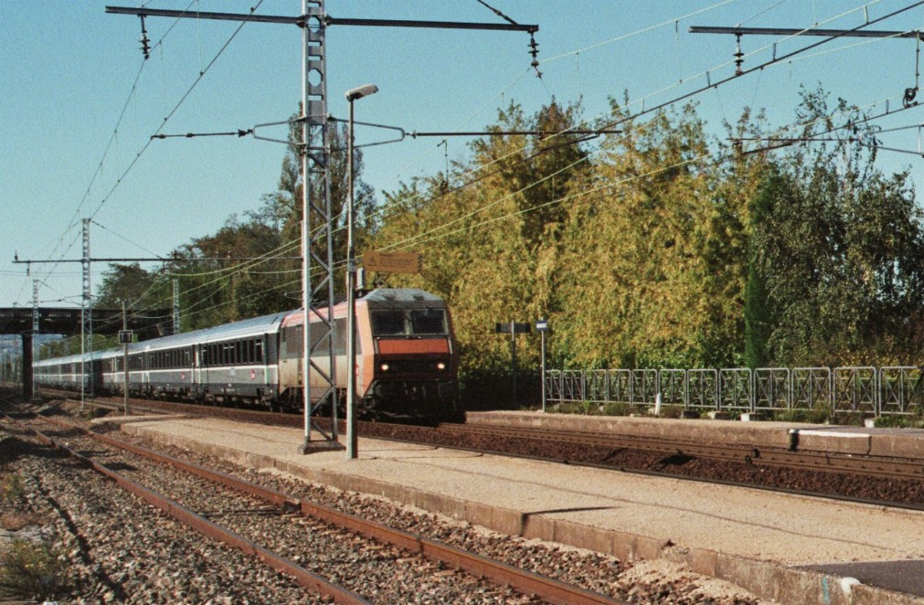 Une rame Corail Dijon - Lyon en transit à Quincieux